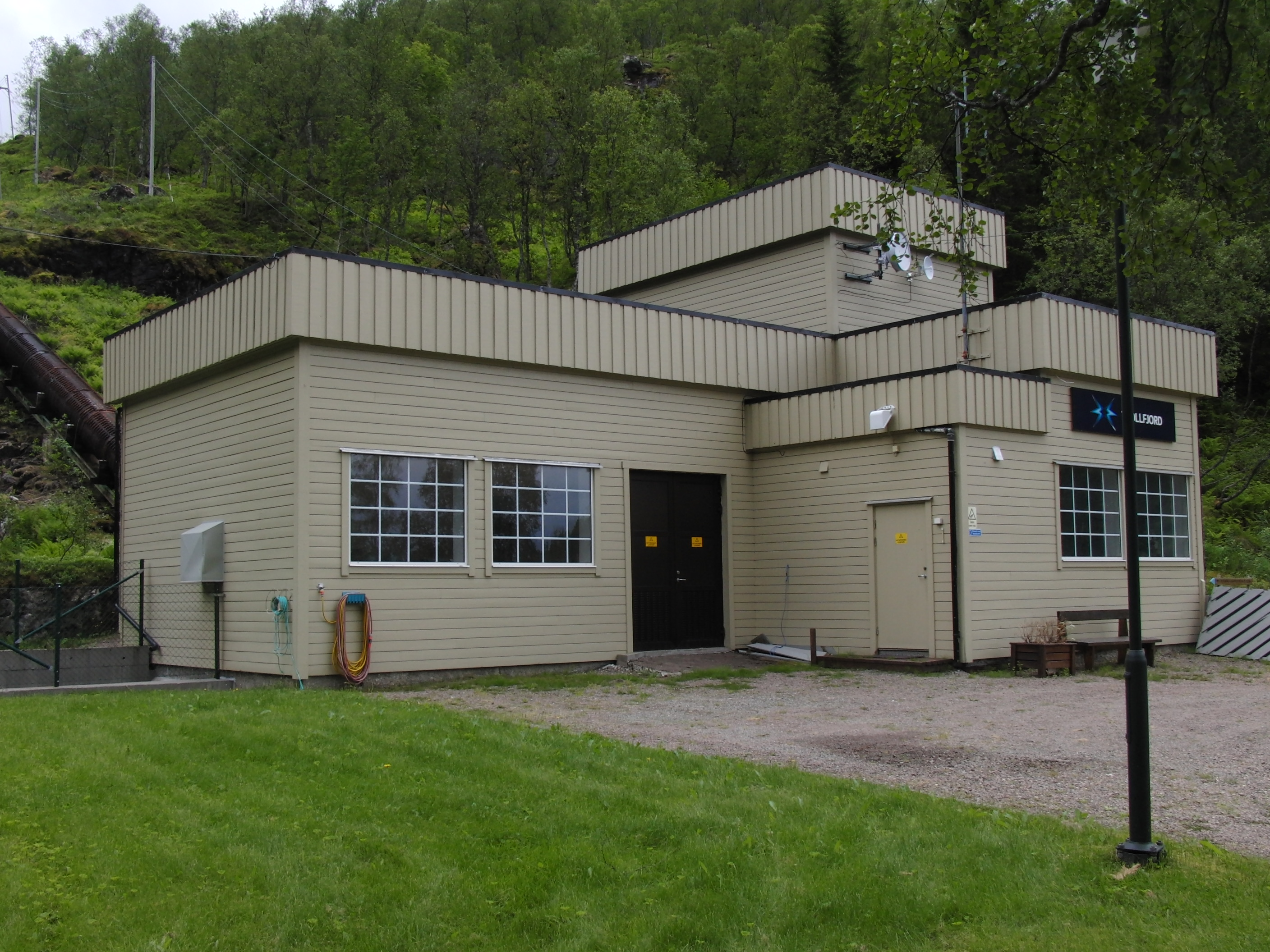 Fiskefjord kraftverk